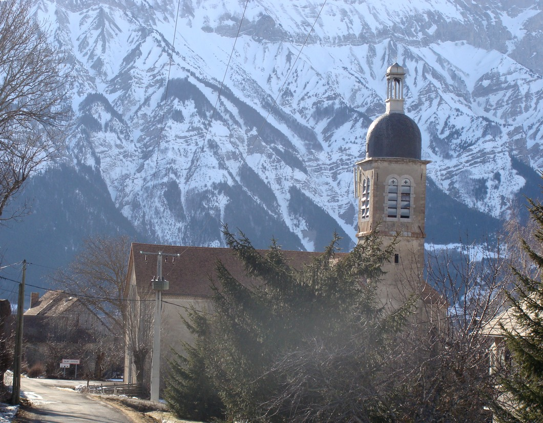 L'église de Saint-Eusèbe-en-Champsaur (Hautes-Alpes). Son clocher à bulbe est unique dans la région.